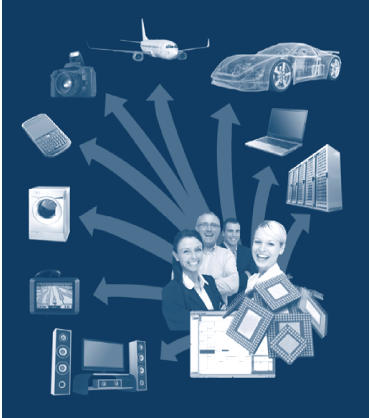 Wirkspektrum der Technischen Informatik